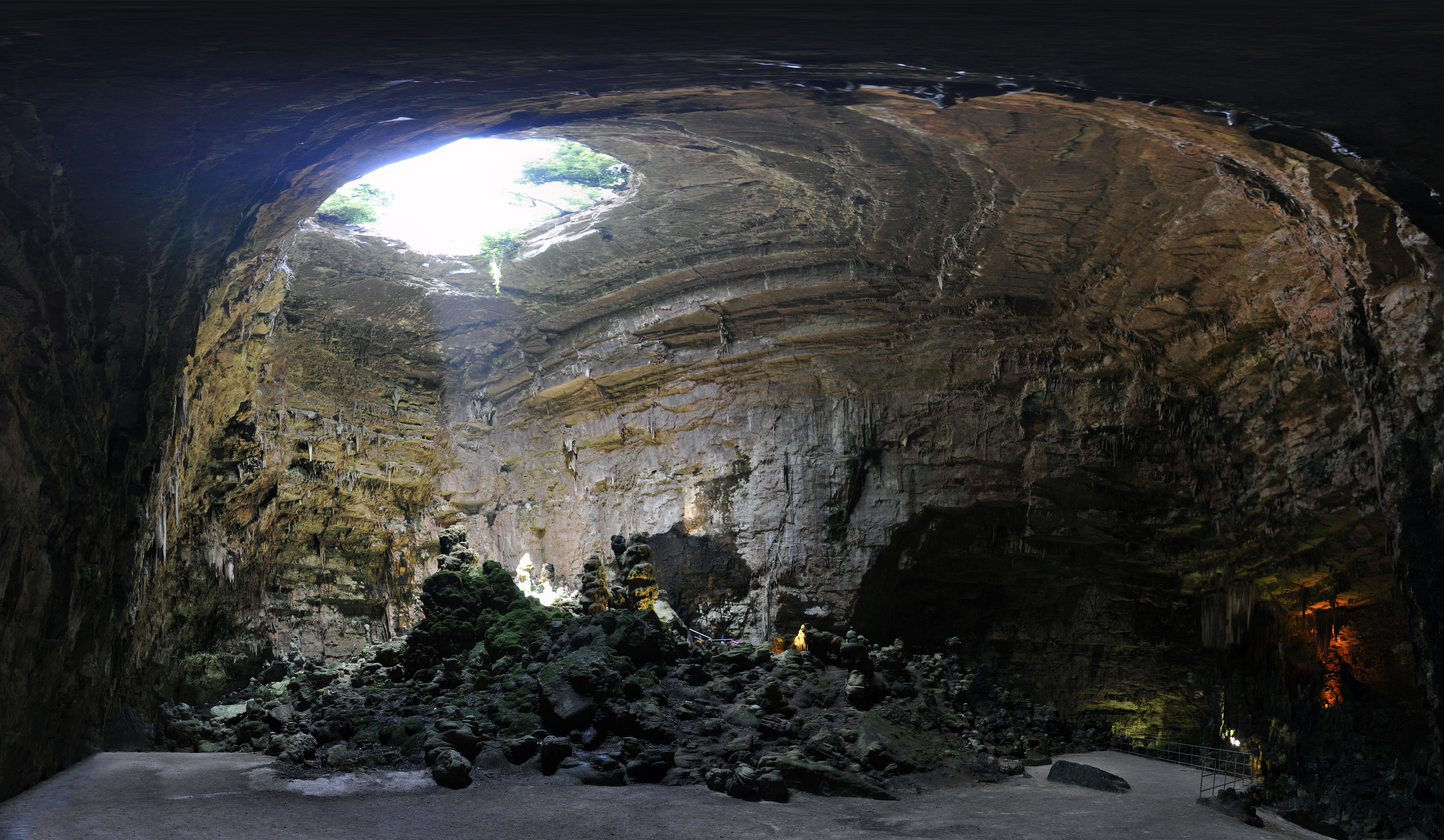 Grotte di Castellana (BA) Italy - August 16, 2010